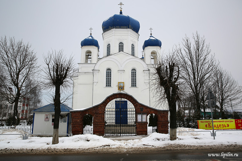 Шклоў. Спаса-Праабражэнская царква. Фасад